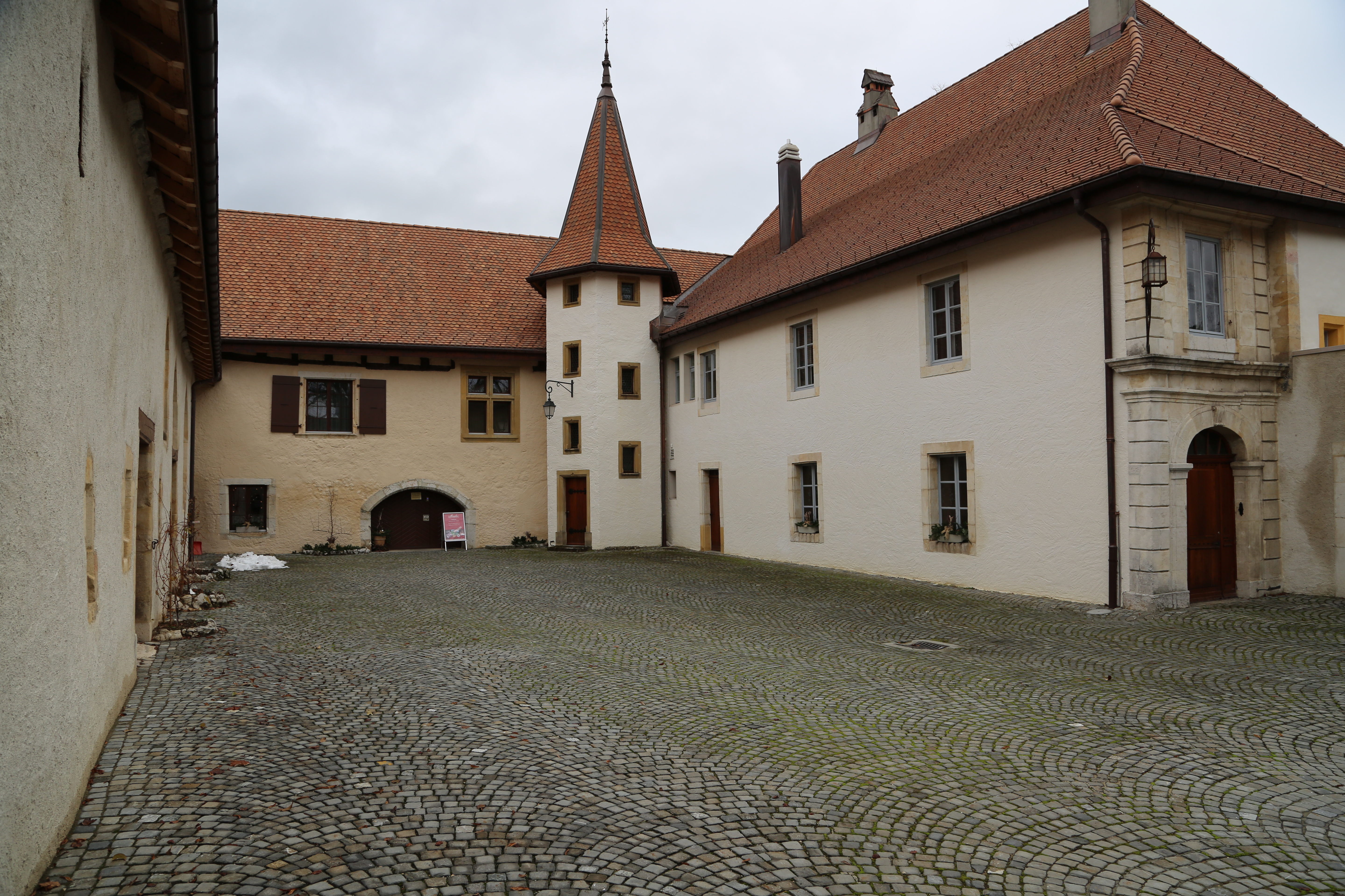 Cour du prieuré Saint-Pierre de Môtiers, après les travaux de conservation